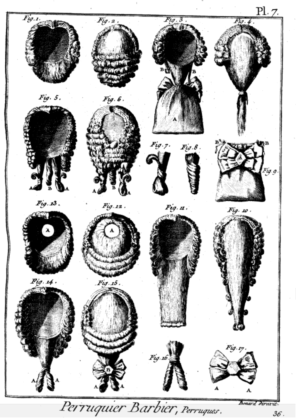 Figures 1 et 2 : intérieur et extérieur d'une perruque en bonnet ; fig. 3 et 4 : perruque à bourse ; fig. 5 et 6 : perruque à noeuds ; fig. 7 : noeuds de la même perruque ; fig. 8 : boudin de la même perruque ; fig. 9 : bourse à la rosette ; fig. 10 et 11 : perruque naissante ; fig. 12 et 13 : perruque d'abbé à tonsure ; fig. 14 et 15 : perruque à la brigadière ; fig. 16 : boudins de la même perruque ; fig. 17 : rosette de la même perruque.